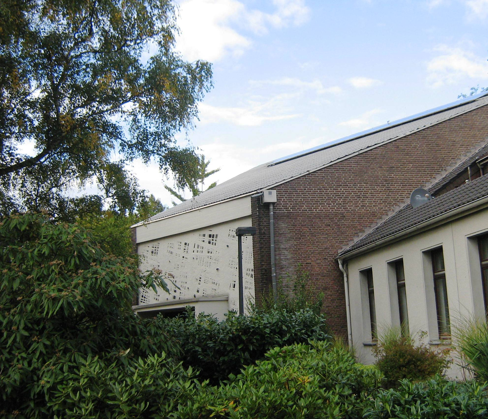 Evangelische Kirche Leverkusen-Qettungen mit Gemeindehaus